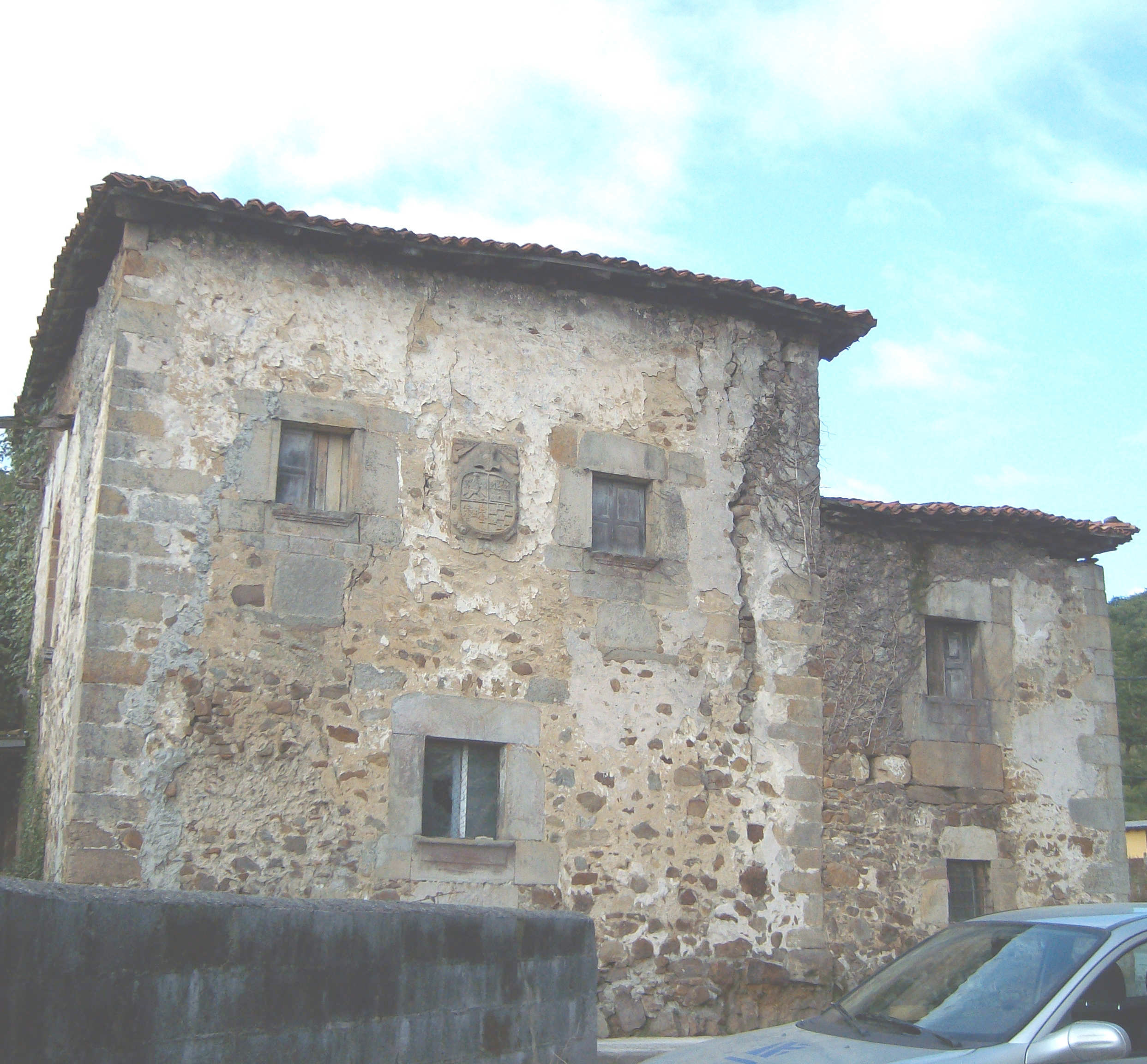 Casa de la Torre en Santuyano, Bimenes.